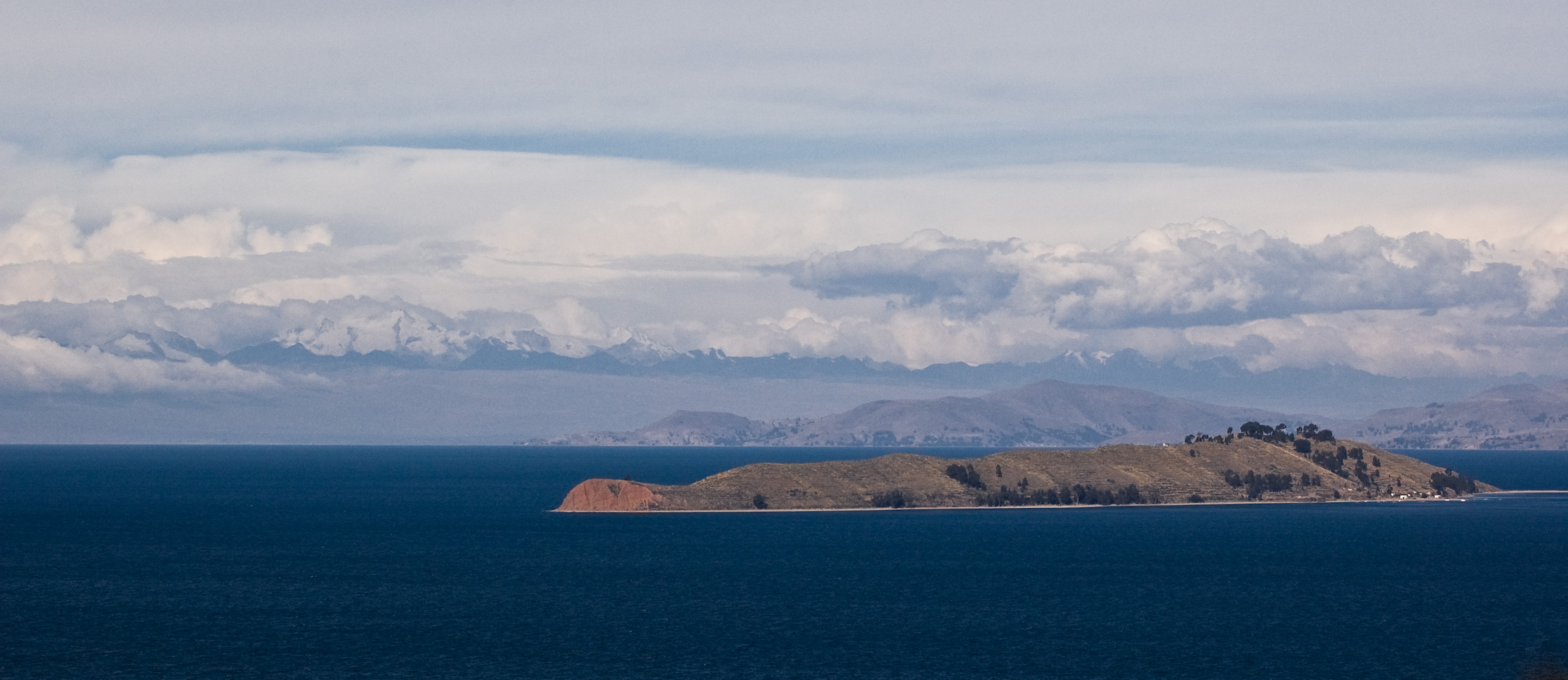 Isla de la Luna, on the lake Titicaca, seen from Isla del Sol, Bolivia.